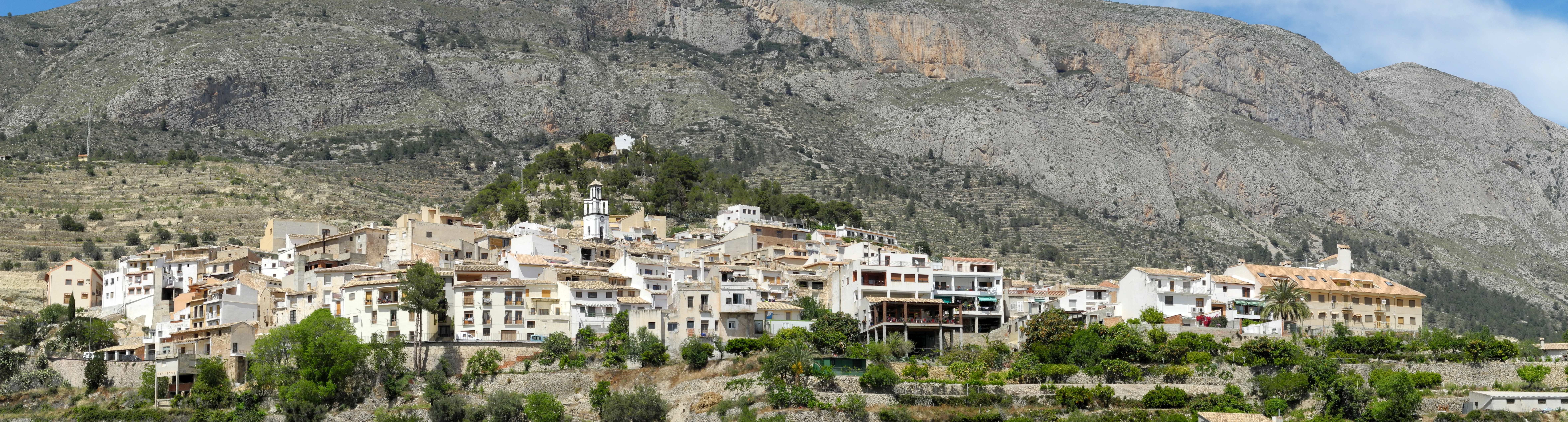 Sella, provincia de Alicante (España)